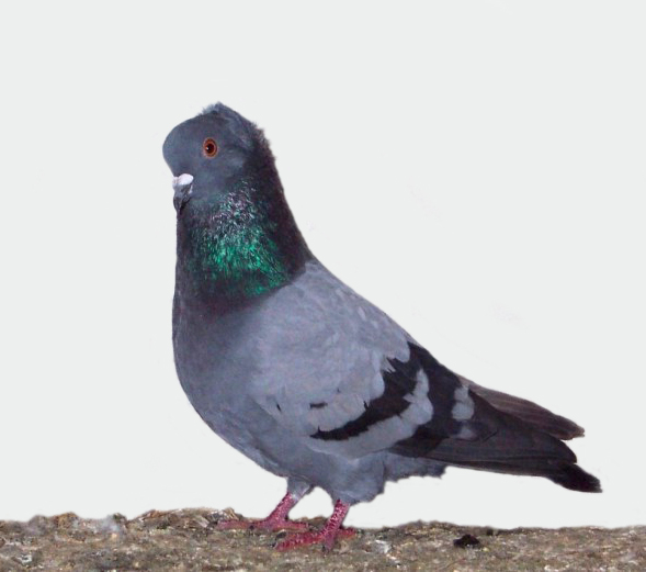 Anatolian Ringbeater (Blue Bar) aka: trabzon(turkish)